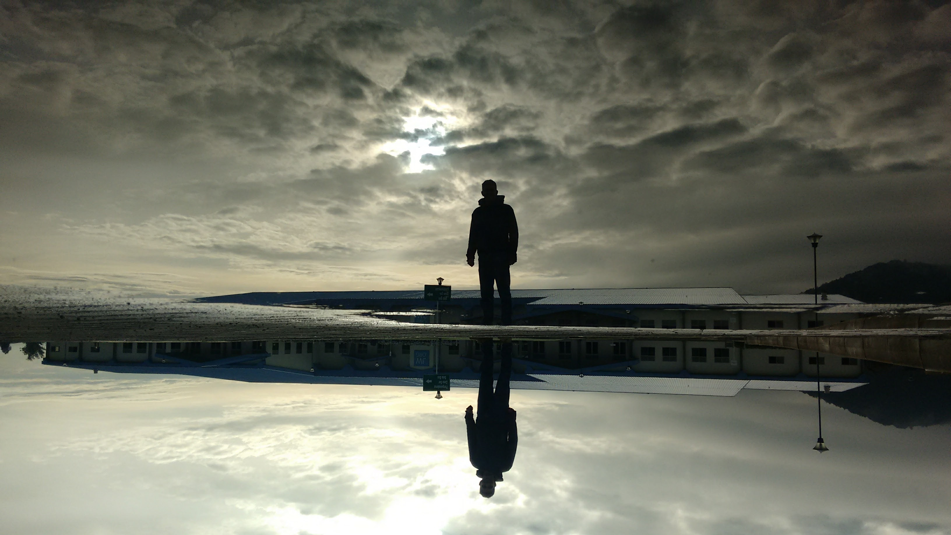 Esta fotografía fue tomada en el municipio colombiano con código Cota cundinamarca.